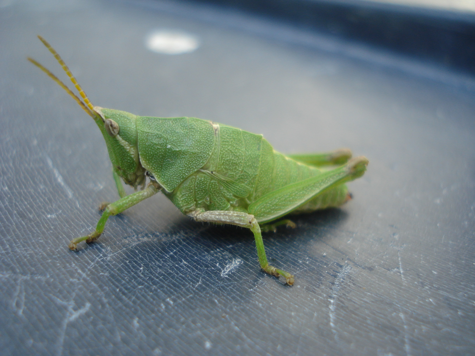 saltamontes encontrado en un jardin